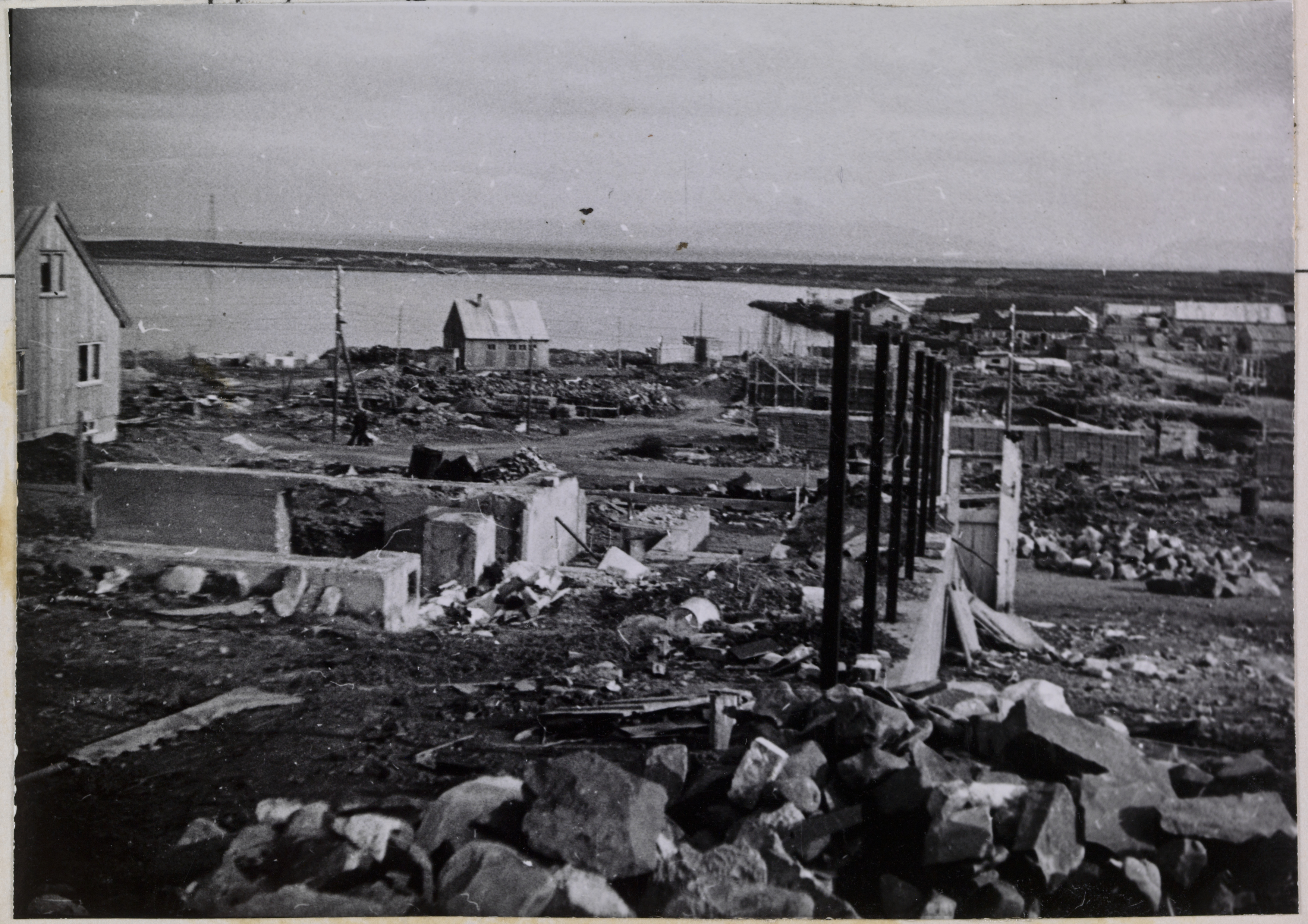 Bildet er hentet fra Arkivverket. Bildet viser de store ødeleggelsene etter tyskernes herjinger. Arkivinstitusjon : Riksarkivet Arkivnavn : Brente steders regulering Sted : NORGE, Finnmark, Vadsø, Emneord: 2. verdenskrig, andre verdenskrig, branntomt, Nord-Norge, brannruin Avbildet